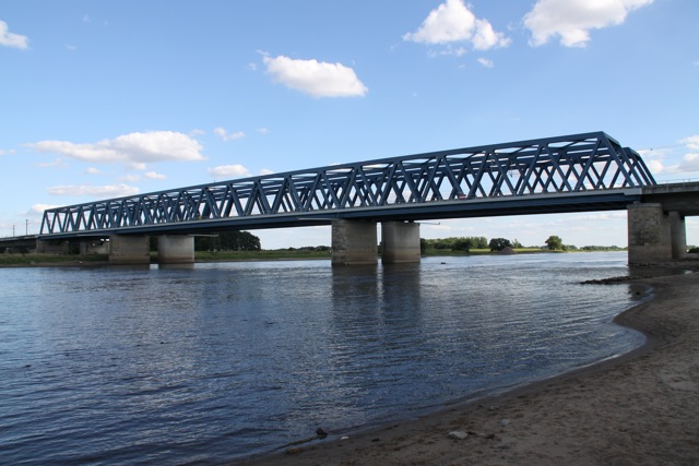 Eisenbahnbrücke Hämerten